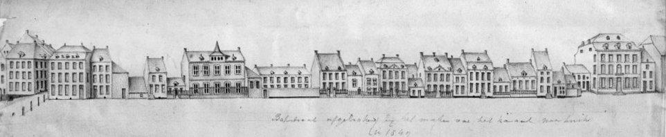 Bokstraat/Bonnefantengrachtje: Bokstraat (huizen afgebroken in 1849 bij het maken van het kanaal) tekening van Gulpen